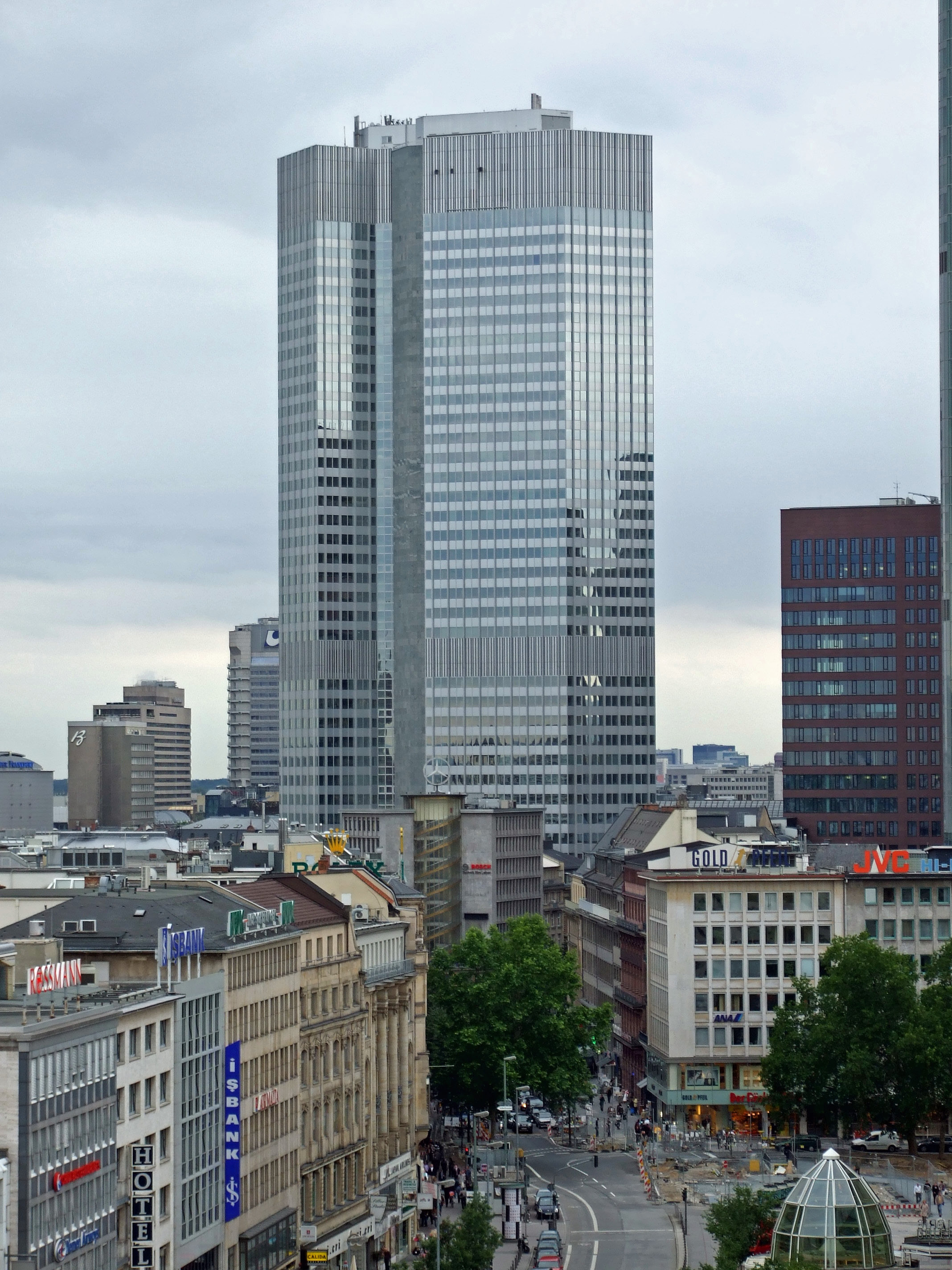 Eurotower, Sitz der Europaeischen Zentralbank in Ffm